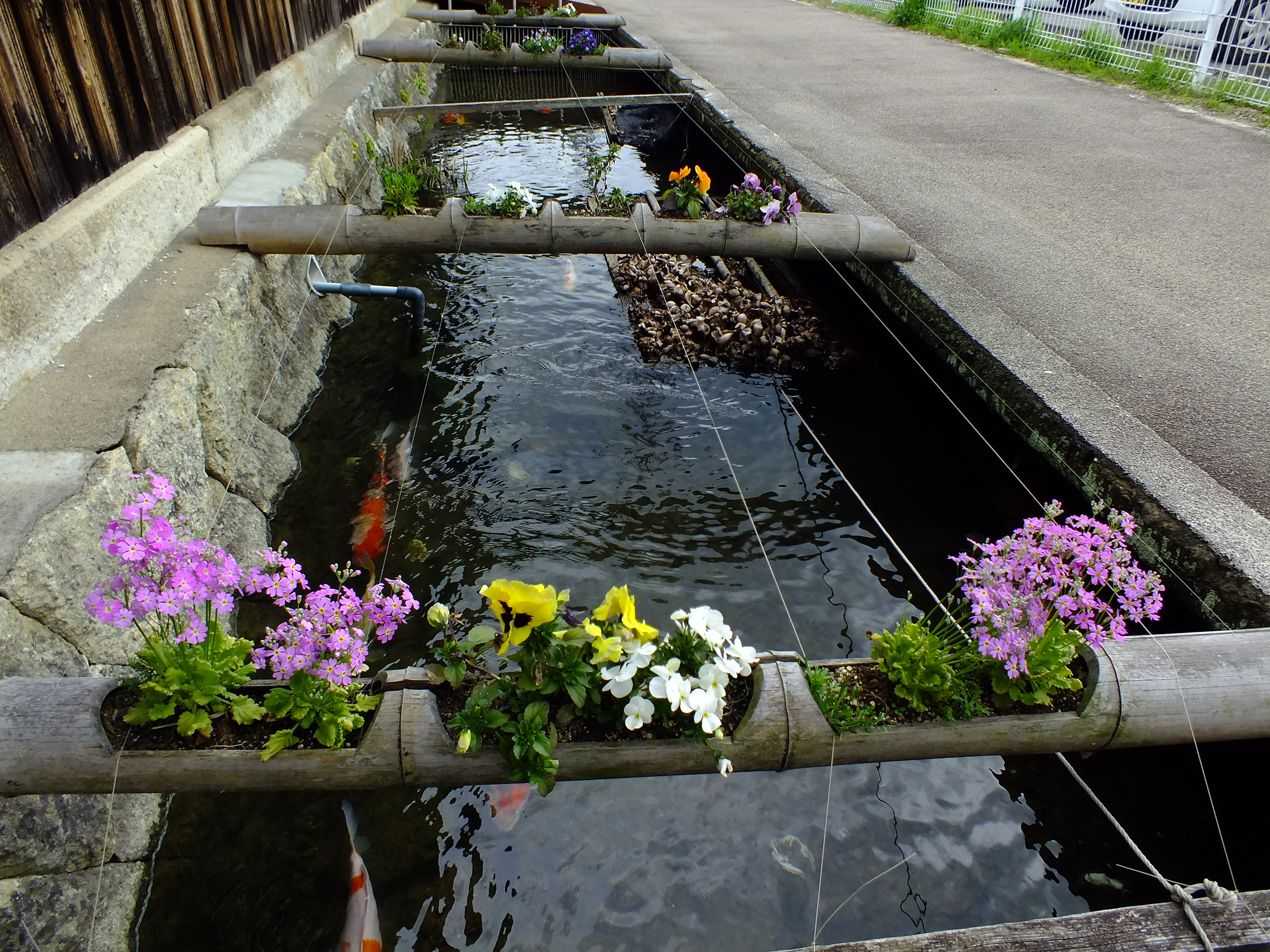 Old Kishi-House Nishiwaki,Hyogo,Japan 旧来住家住宅（来住梅吉旧邸）